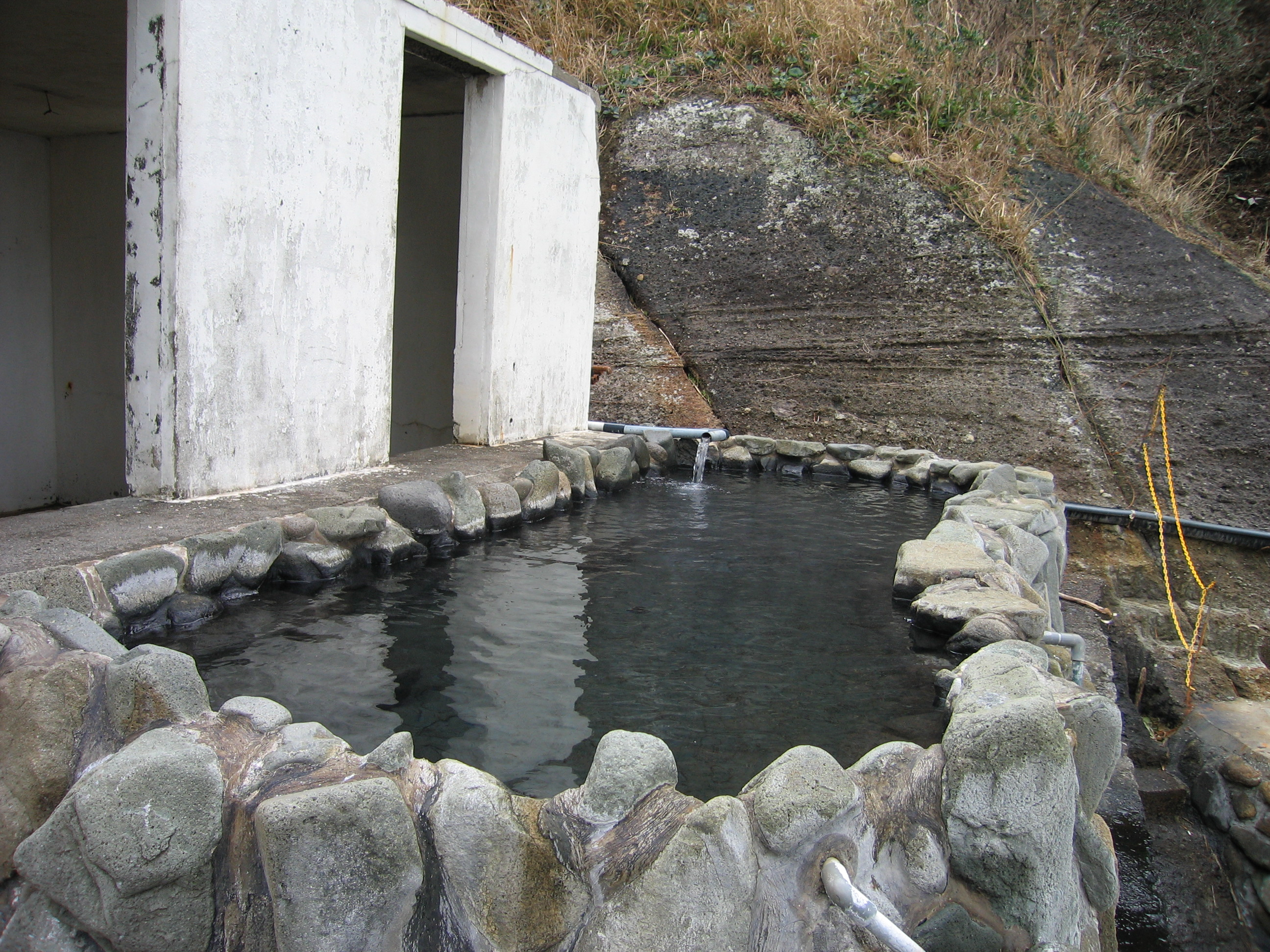 雲見温泉露天風呂